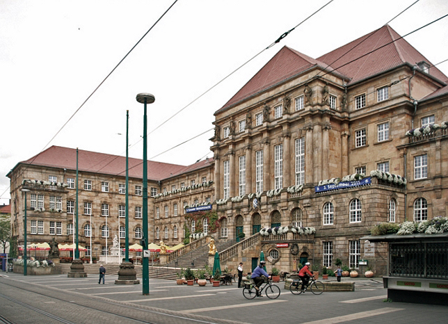 Ansicht des Kasseler Rathauses von der Oberen Königsstraße aus.